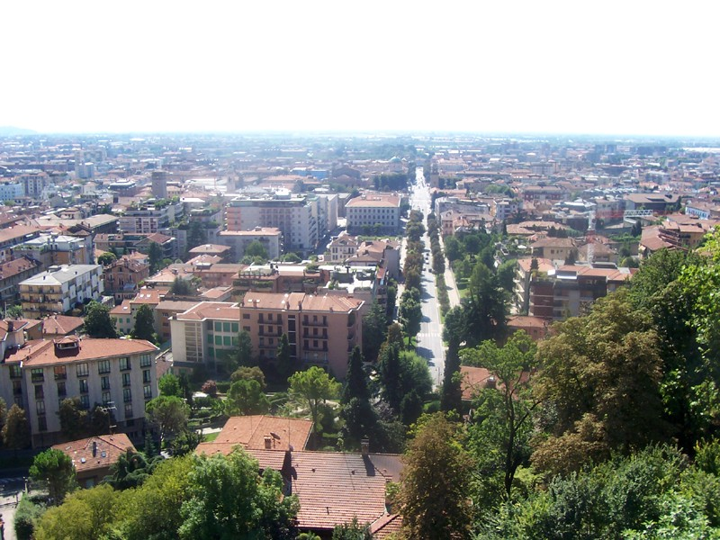 Bergamo - Veduta della città bassa da Porta S. Giacomo